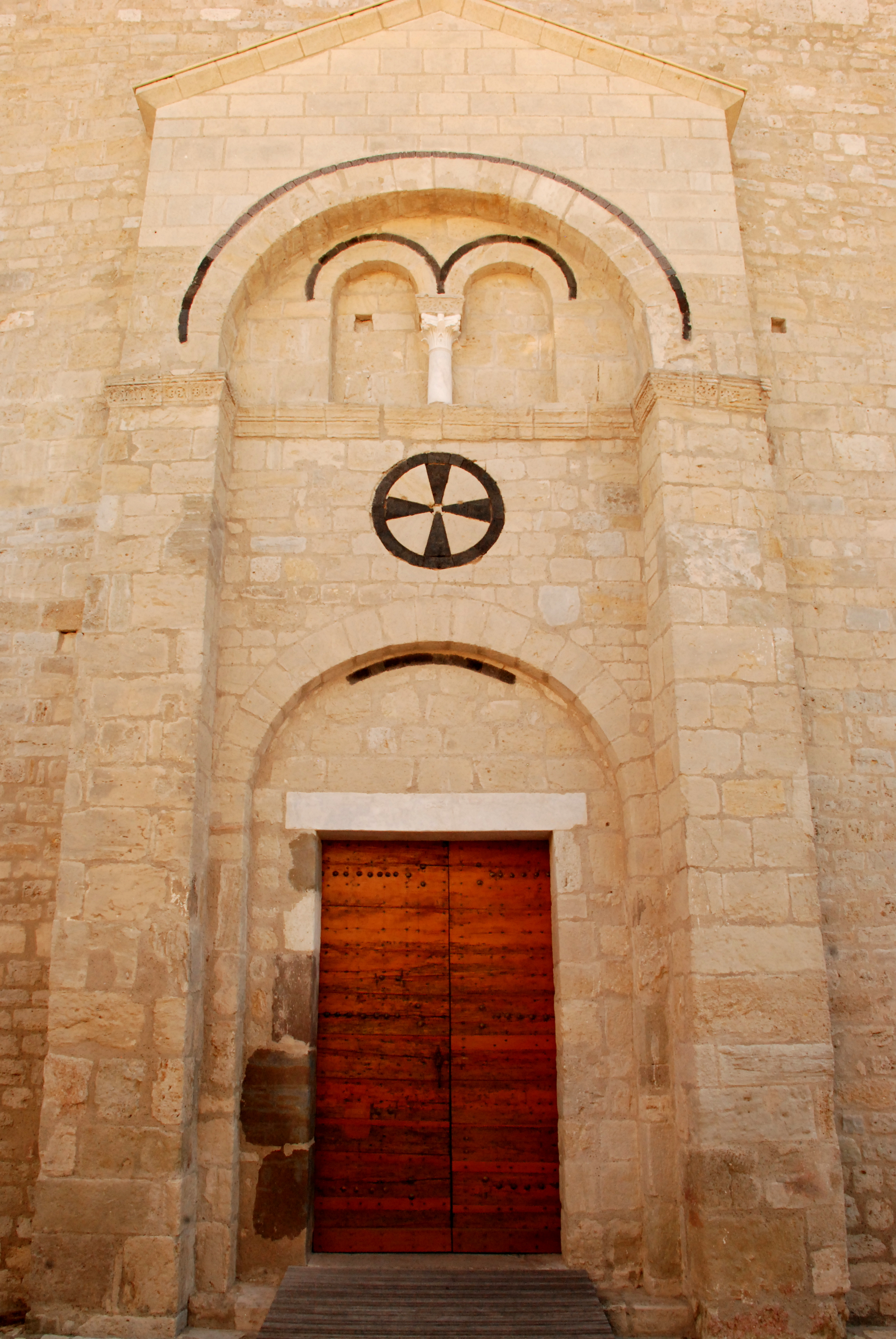 France - Languedoc - Aude - Église Saint-Jean l’Évangéliste d'Ouveillan